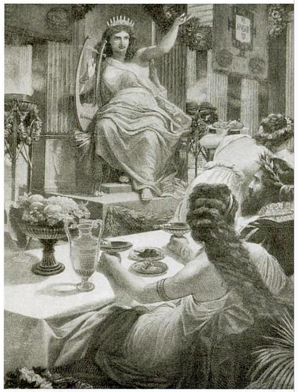 Tétis preside o banquete para os portugueses na Ilha dos Amores, ilustração de Os Lusíadas, edição 1880